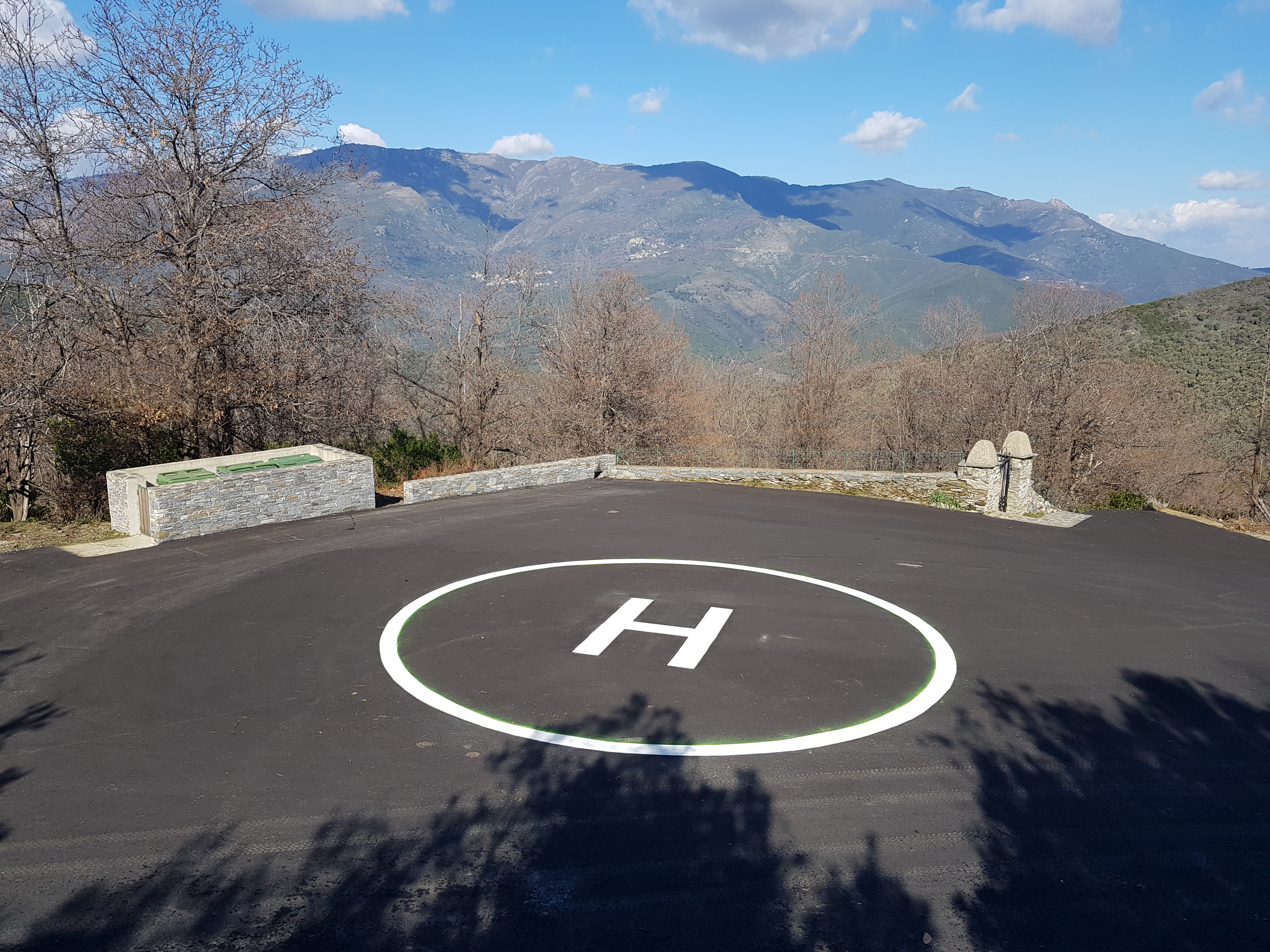 HELISTATION DE DIVINA COMMUNE DE 20290 MONTE